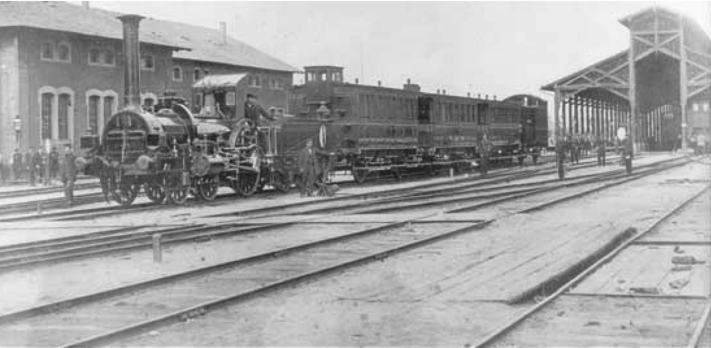 Eröffnungszug der Strecke Mannheim-Ludwigshafen. In der Literatur auch als Hofzug König Ludwig II. bezeichnet.